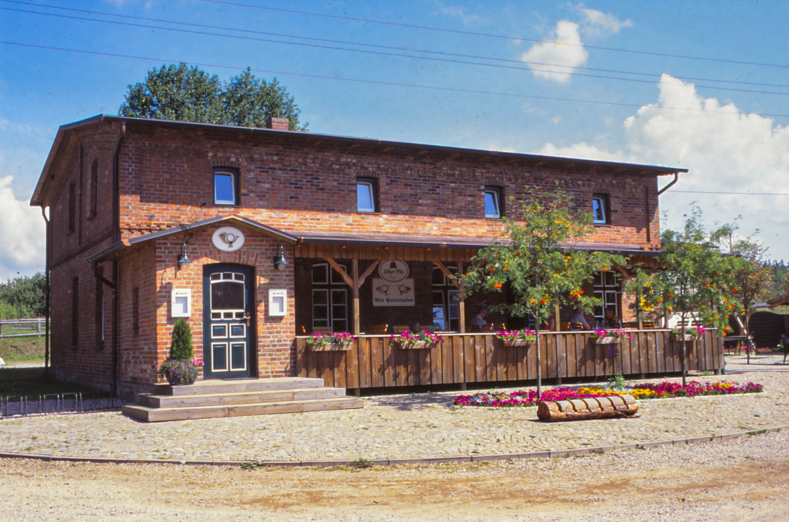 Wieder aufgebaute Alte Poststation in Bornkrug